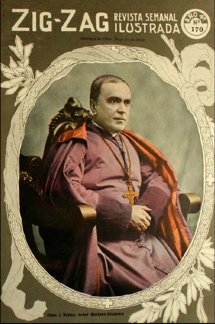 Portada de la Revista ZigZag de 1908. En ella aparece Monseñor Mariano Casanova y Casanova (* Santiago, Chile, 25 de julio de 1833 - † 16 de mayo de 1908) fue el cuarto Arzobispo de Santiago de Chile (1886-1908).